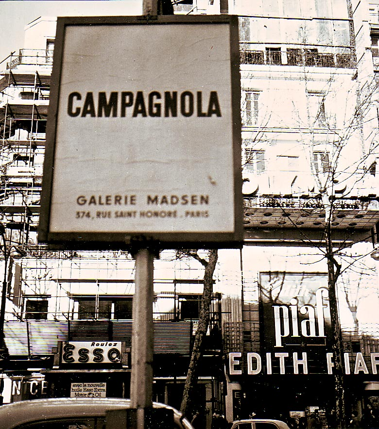 Affiche de l'exposition des oeuvres d'Enrico Campagnola à l'Olympia Paris en 1962.